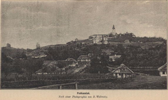 Підкамінь